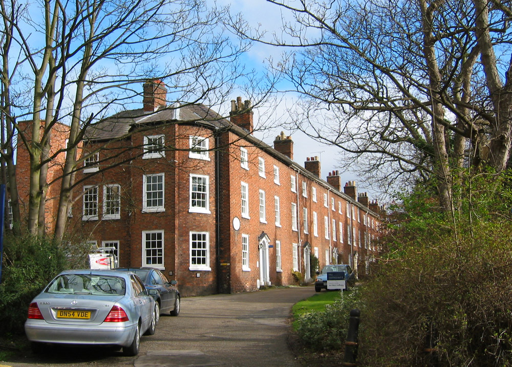 Dysart Buildings, Monks Lane, Nantwich, Cheshire